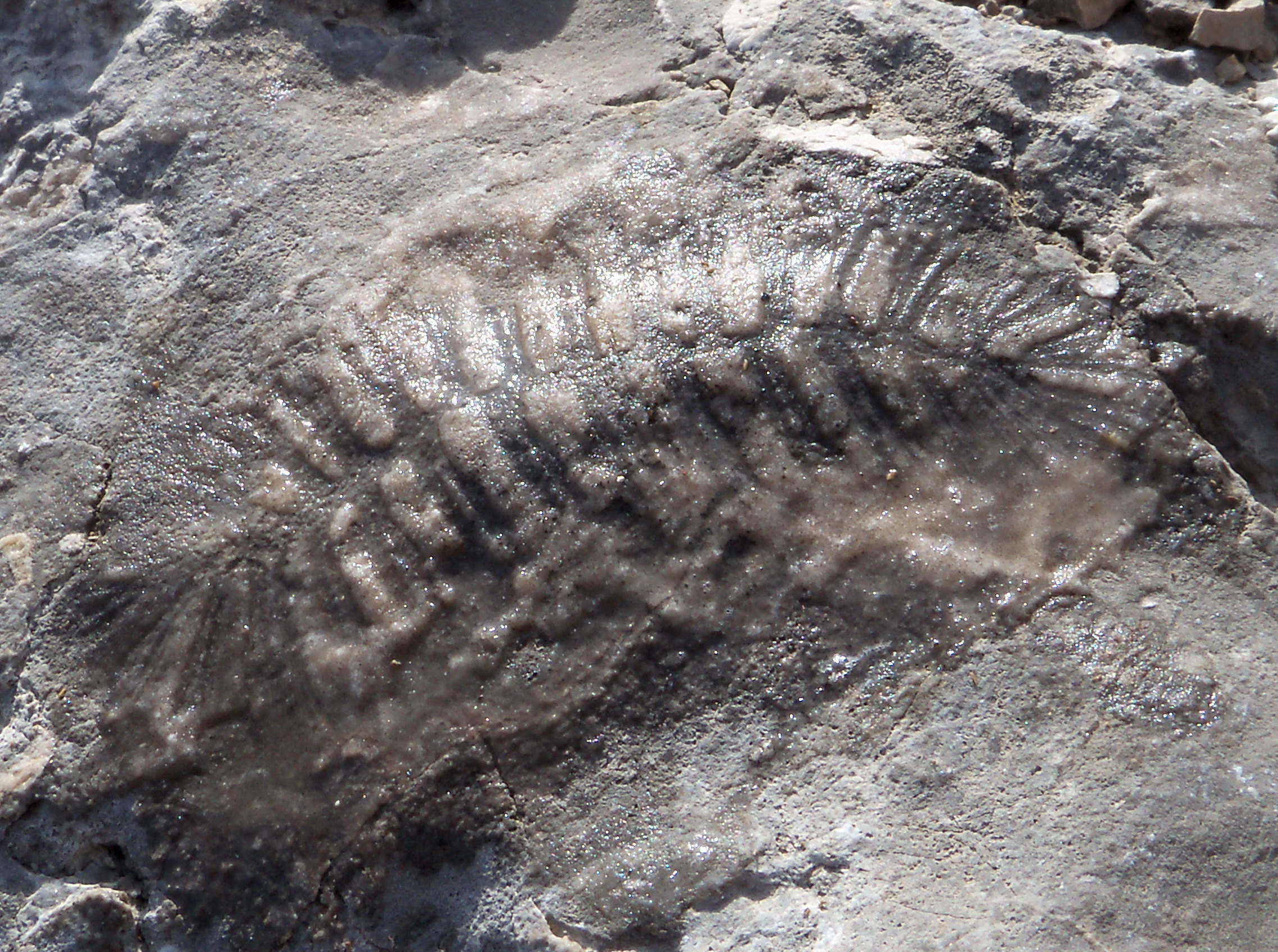 Фосилізація